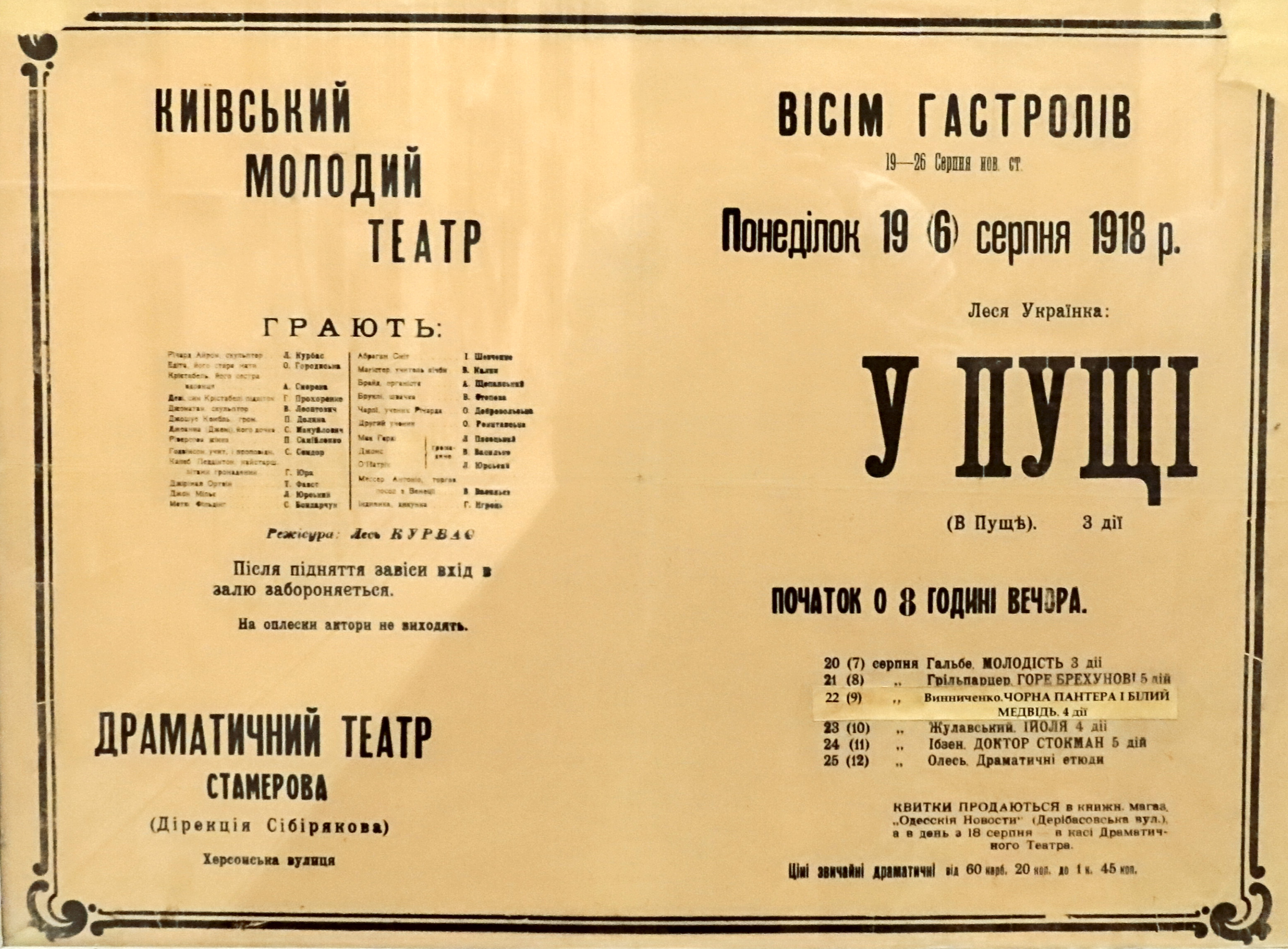 Експозиція Київського музея театрального, музичного та кіномистецтва України. Афіша Молодого театру Л. Курбаса